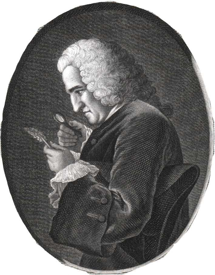 Bernard de Jussieu, Botaniste